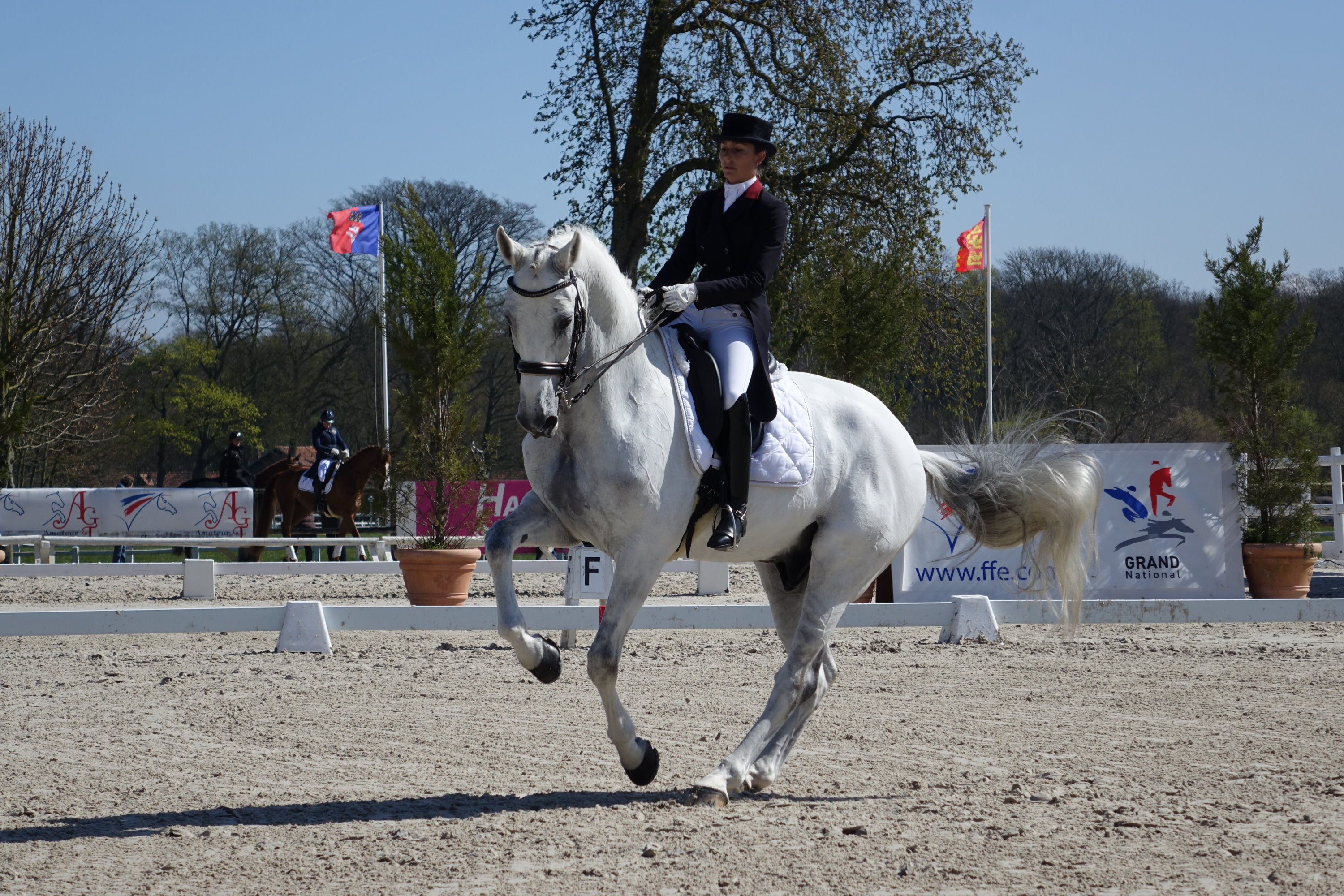 Julia Chevanne et Puschkin 11 au Grand National Dressage 2016, Haras de Jardy, Hauts-de-Seine, France